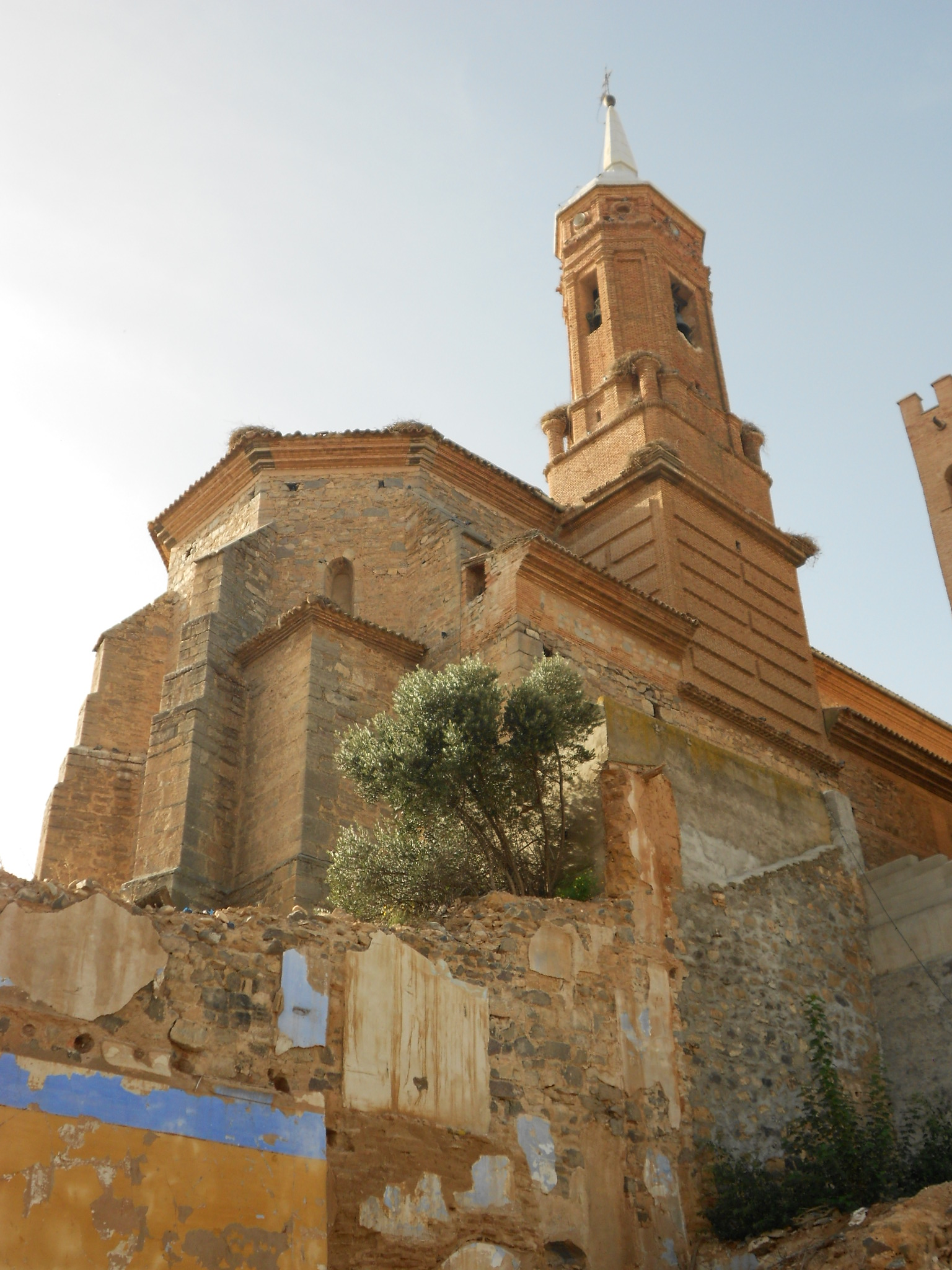 Iglesia parroquial de San Bartolomé (Calatorao, España)